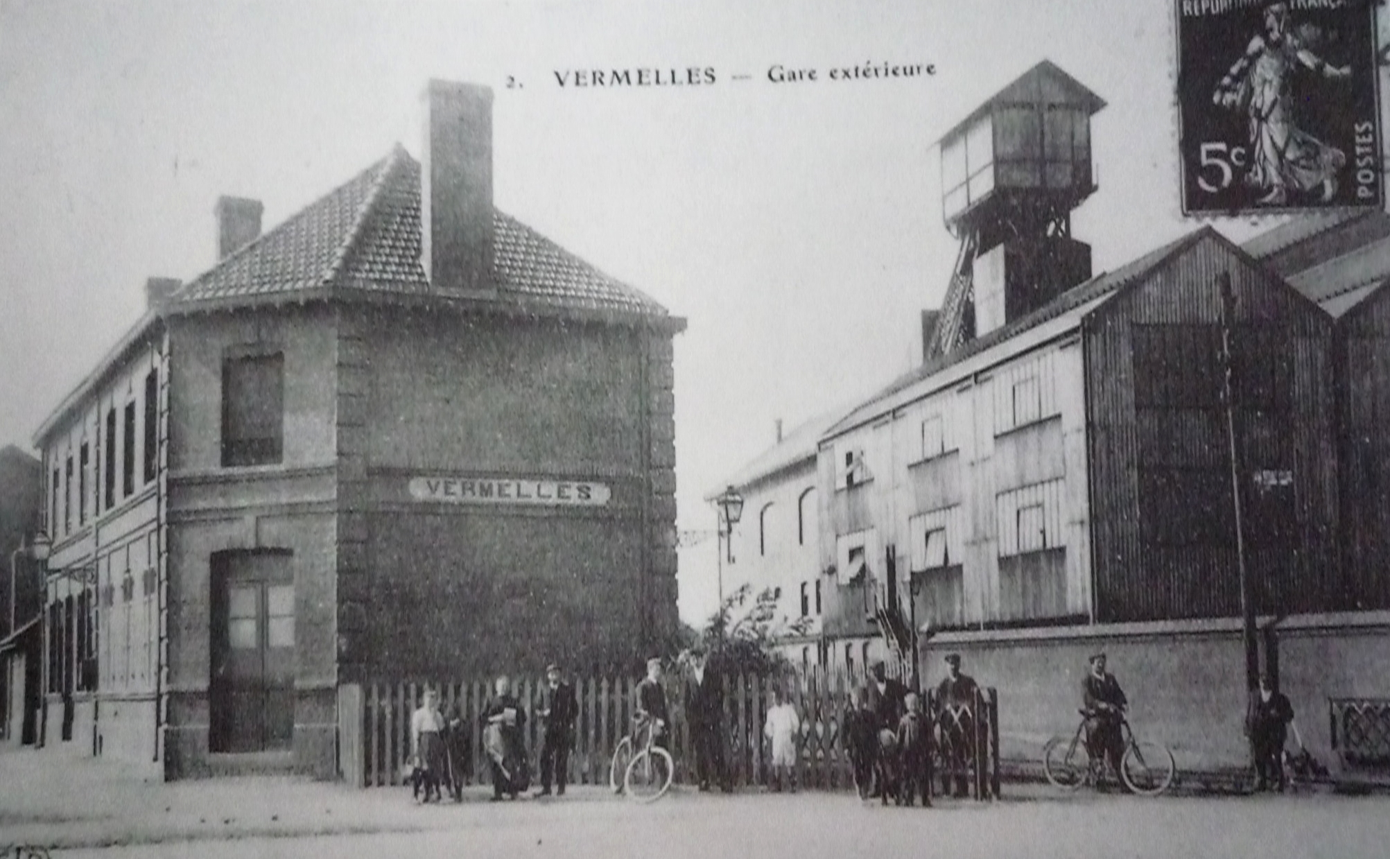 La Fosse n° 3 de la Compagnie des mines de Béthune était un charbonnage constitué d'un seul puits situé à Vermelles, Pas-de-Calais, Nord-Pas-de-Calais, France.